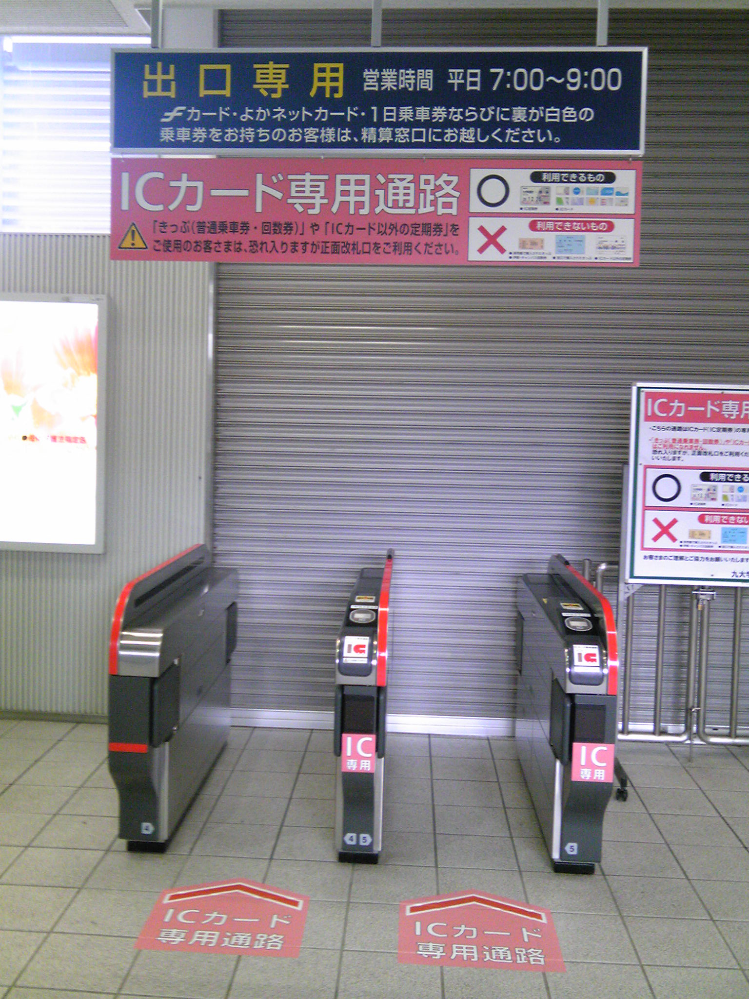 ICカード専用の自動改札機 JR九大学研都市駅（福岡市西区）